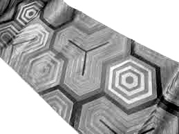 帯